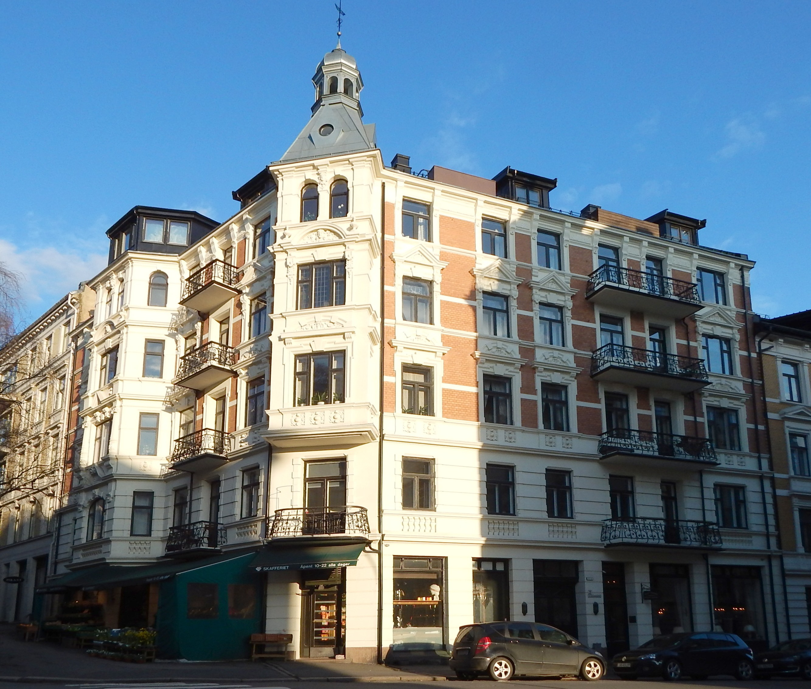 Elisenbergveien 7. Arkitekt: Ludwig Zapffe (1898).